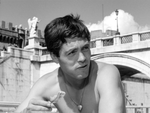 Accattone